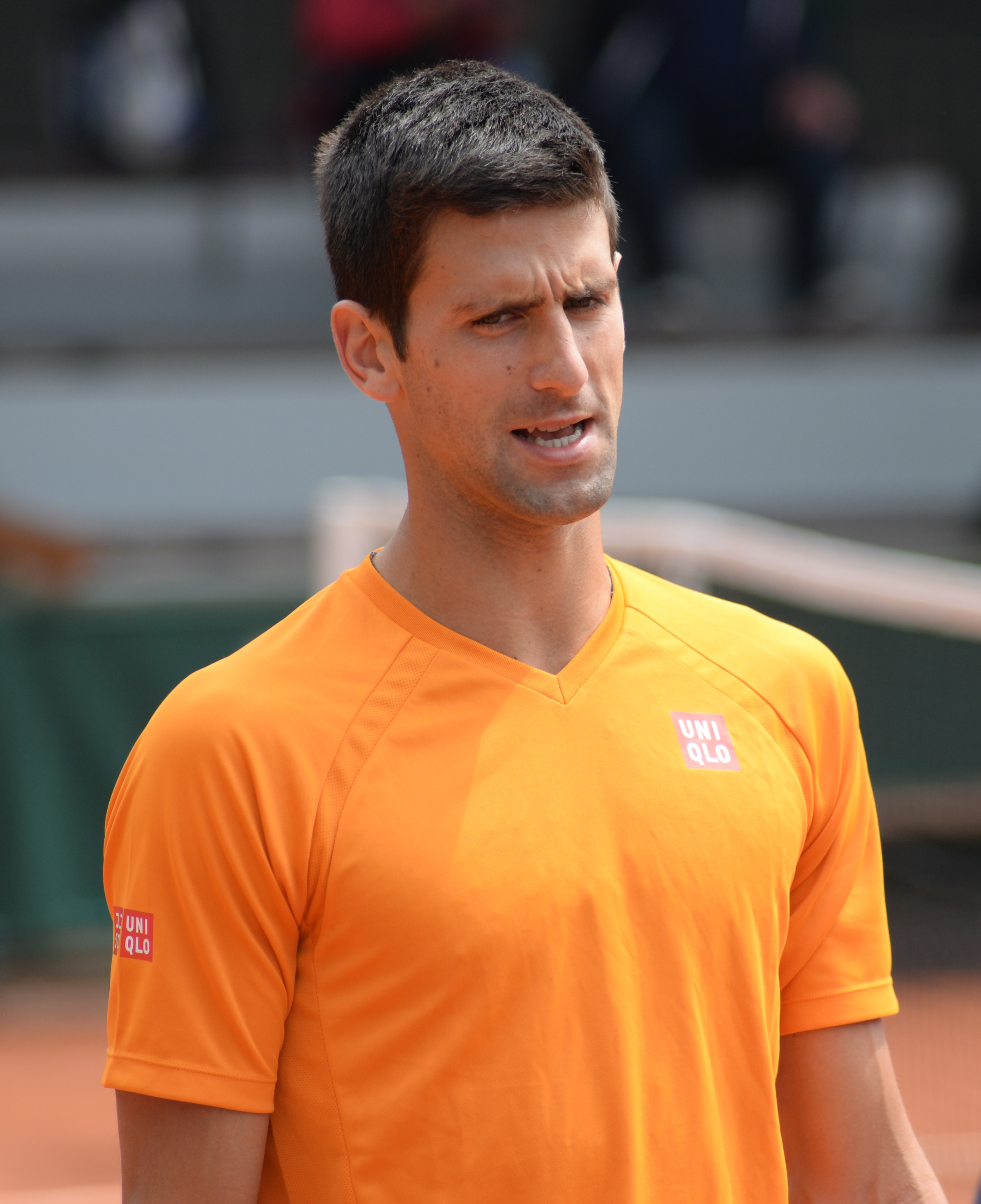 Novak Djokovic